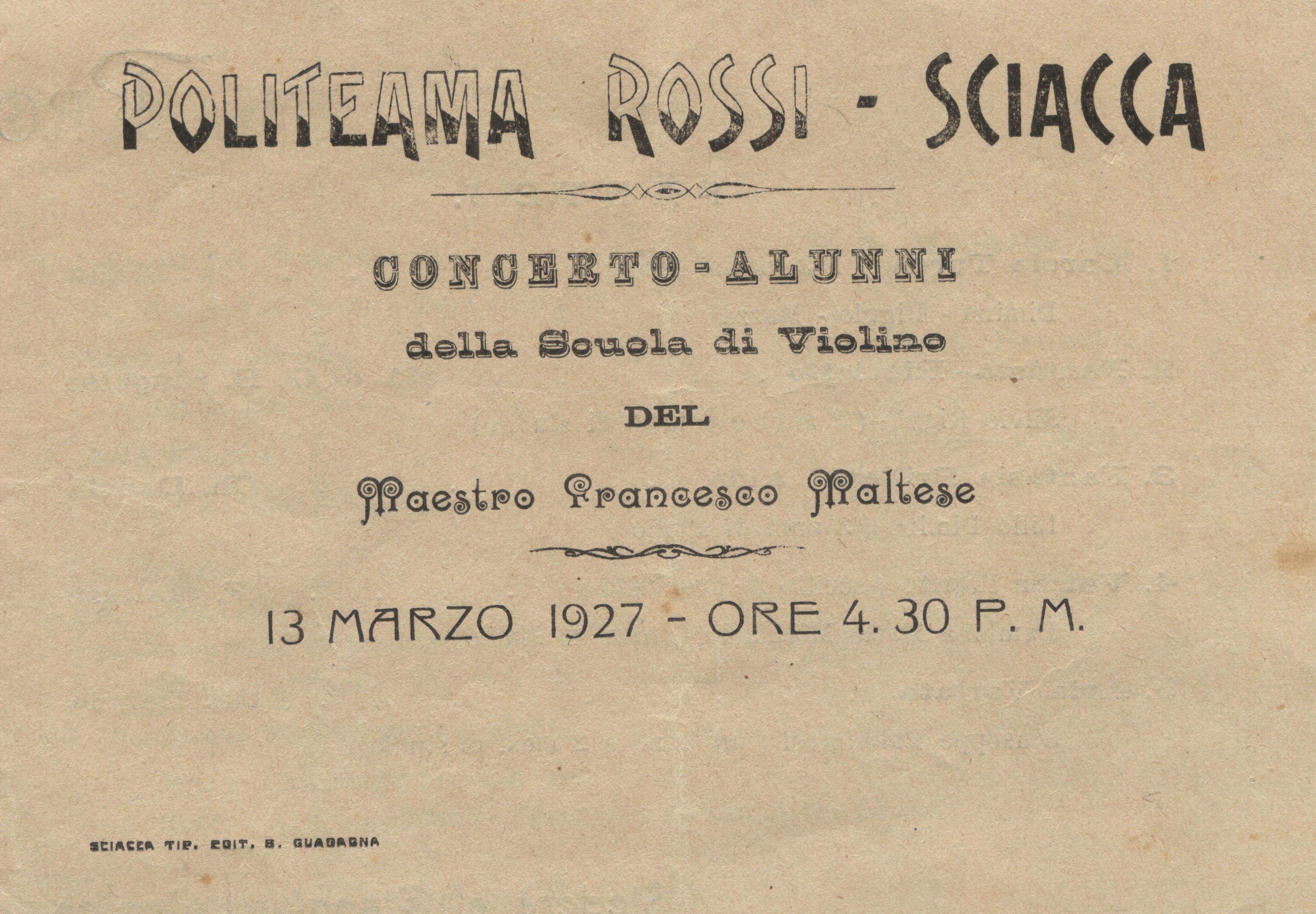 Dettaglio della locandina del "Politeama Rossi" di Sciacca (1927), con programma del concerto degli alunni della scuola di violino del maestro Francesco Maltese. 1. 2. 3.